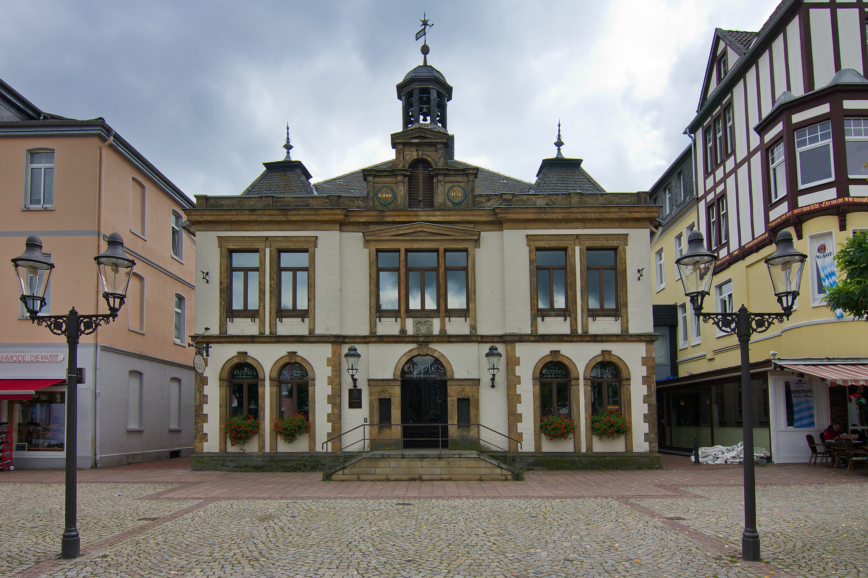 Das Alte Rathaus von 1827 befindet sich am Marktplatz in Peine auf dem gleichen Platz wie die Vorgängergebäude.